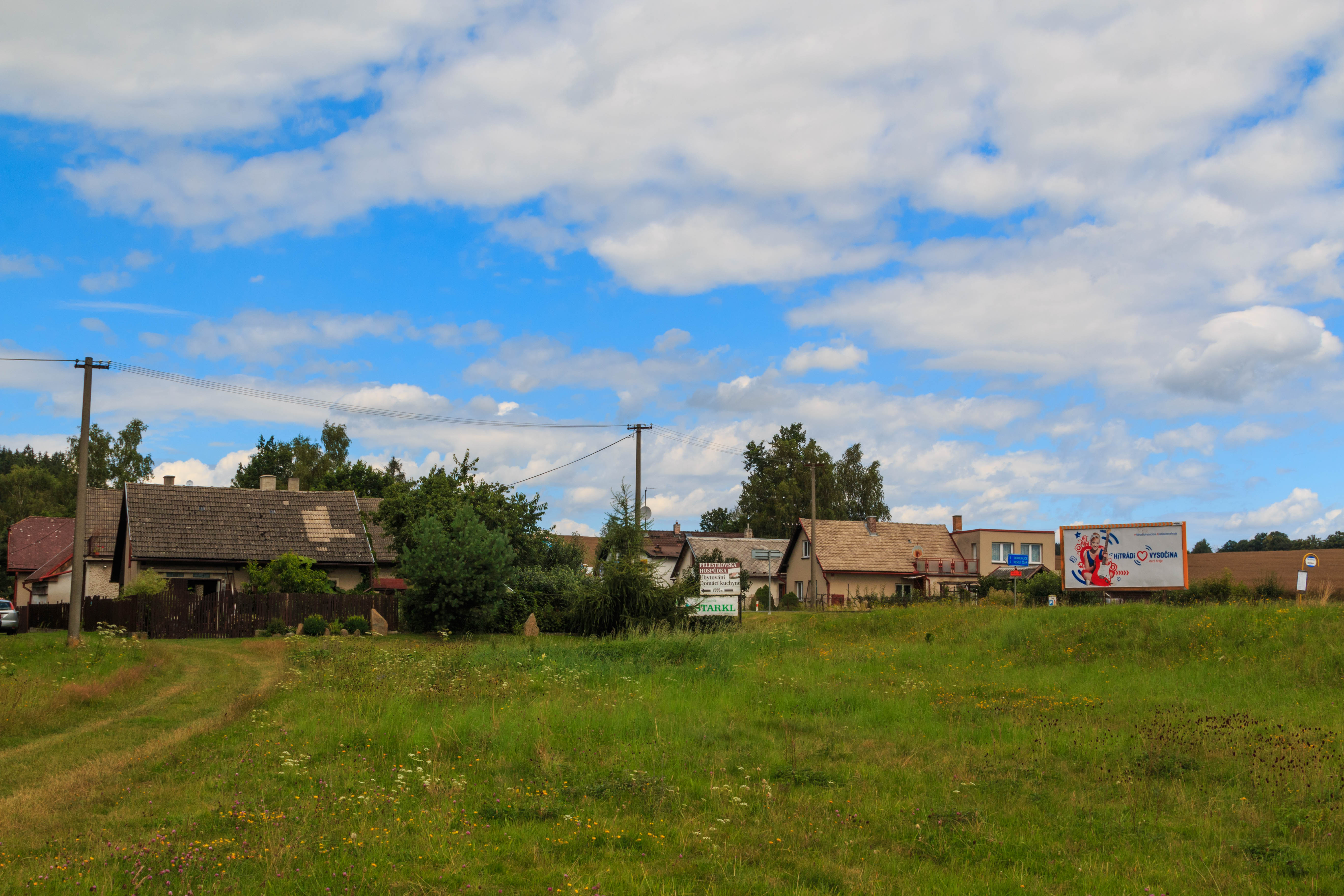 Pelestrov - čp. 77